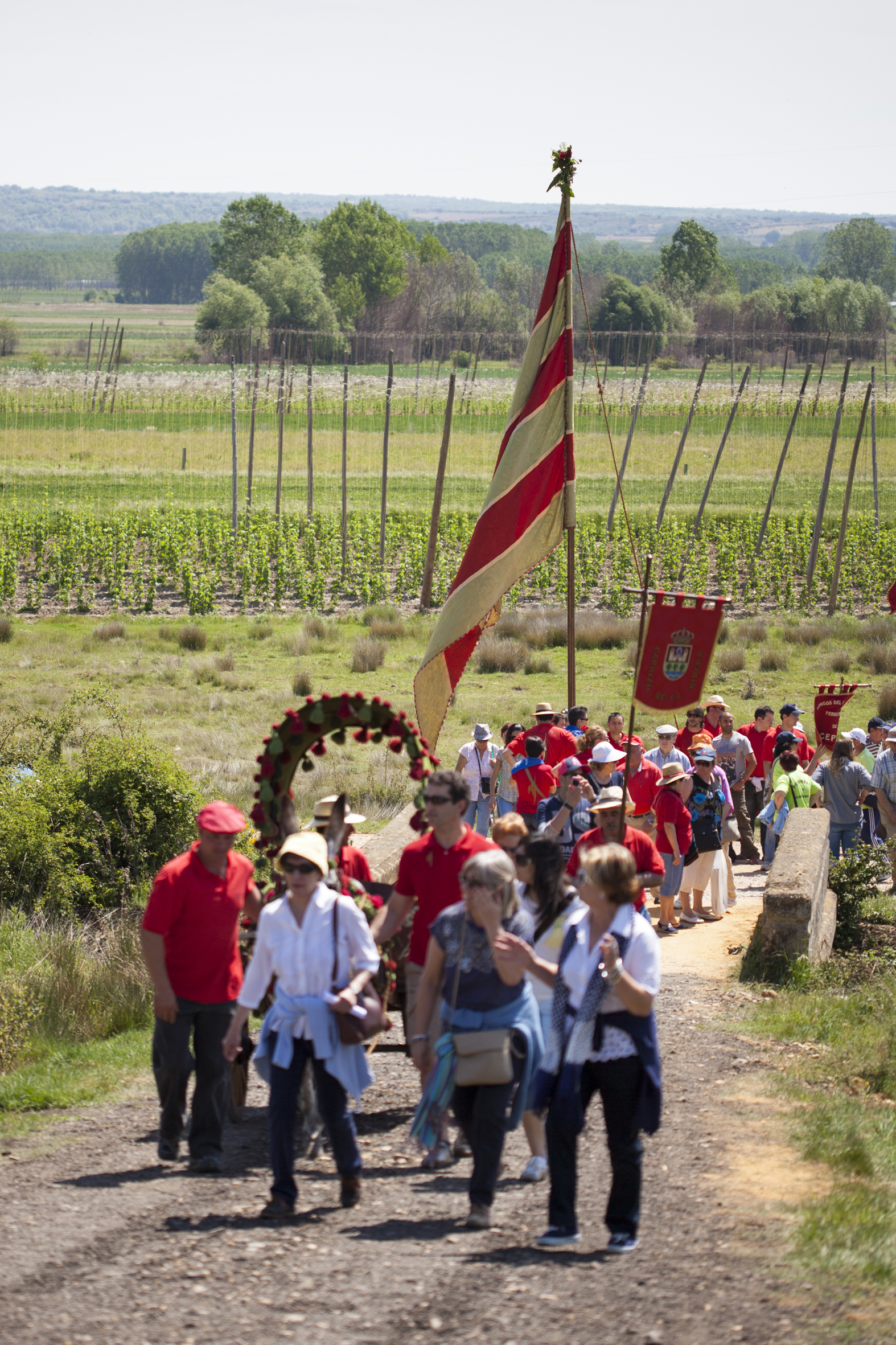 Romería de Nuestra Señora de la Virgen del Villar en Carrizo de la Ribera, León, España. Martes de Pentecostés. 2012 This is a photography of a Folklore festival in Spain (Wikidata id Q26756828).